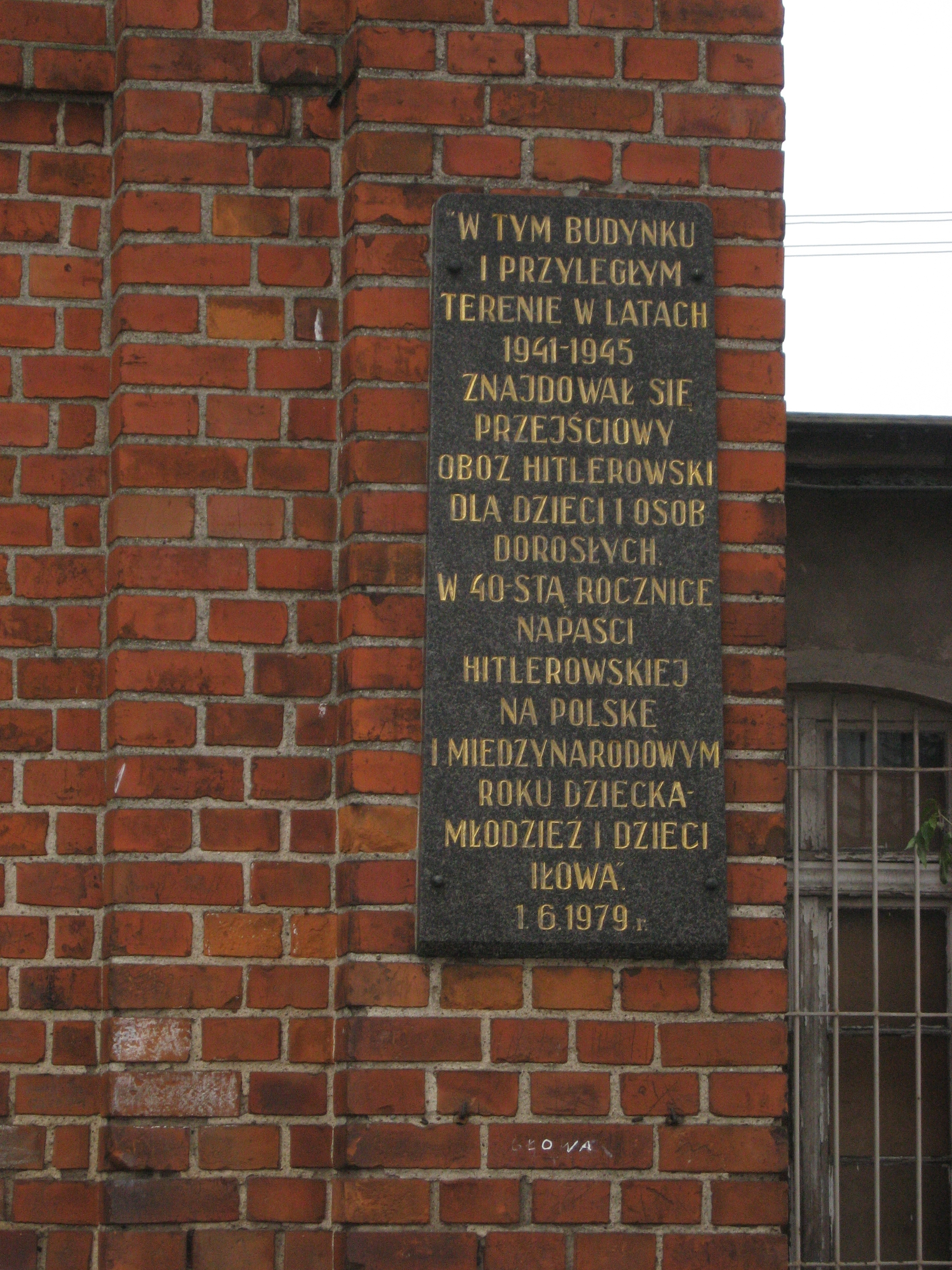 Iłowo-Osada - Budynek, w którym po II wojnie światowej mieściła się Zasadnicza Szkoła Zawodowa, a wcześniej (przed wojną) Towarzystwo Okrętowe (zajmujące się emigrantami z terenów Polski do Ameryki) oraz (w czasie okupacji hitlerowskiej) budynek zajmowany służby SS (obok znajdował się przejściowy obóz hitlerowski). Obecnie budynek jest ruiną i wstęp do niego jest wzbroniony. Tablica upamiętniająca ofiary obozu.